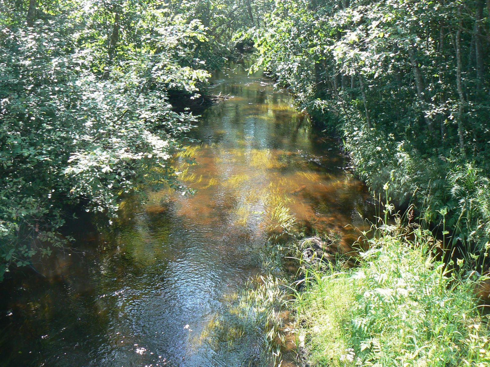 Pedja jõgi Metsakülas